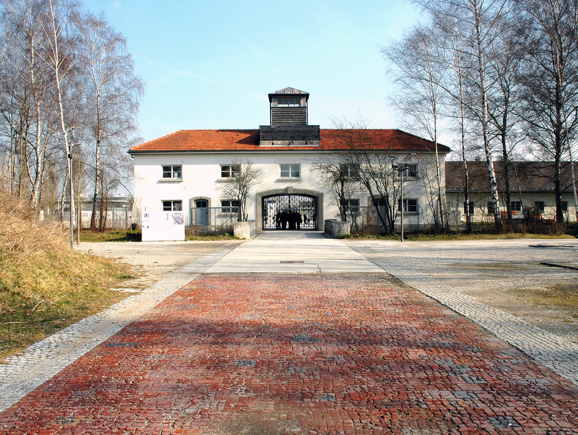 Dachau KZ-Gedenkstätte - Haupttor